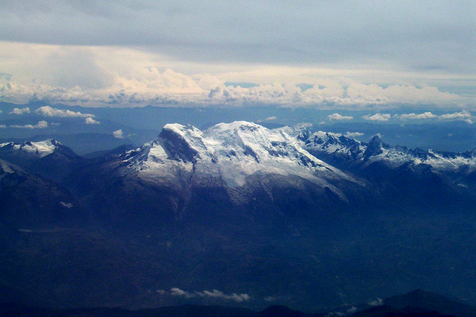 El Huascarán, la montaña más alta del Perú, en la Cordillera Blanca